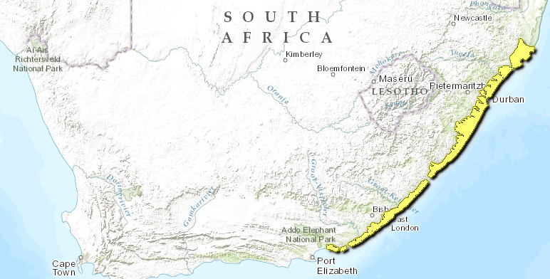 Mappa Ecoregione AT0116 - Foresta costiera a mosaico di KwaZulu-Cape